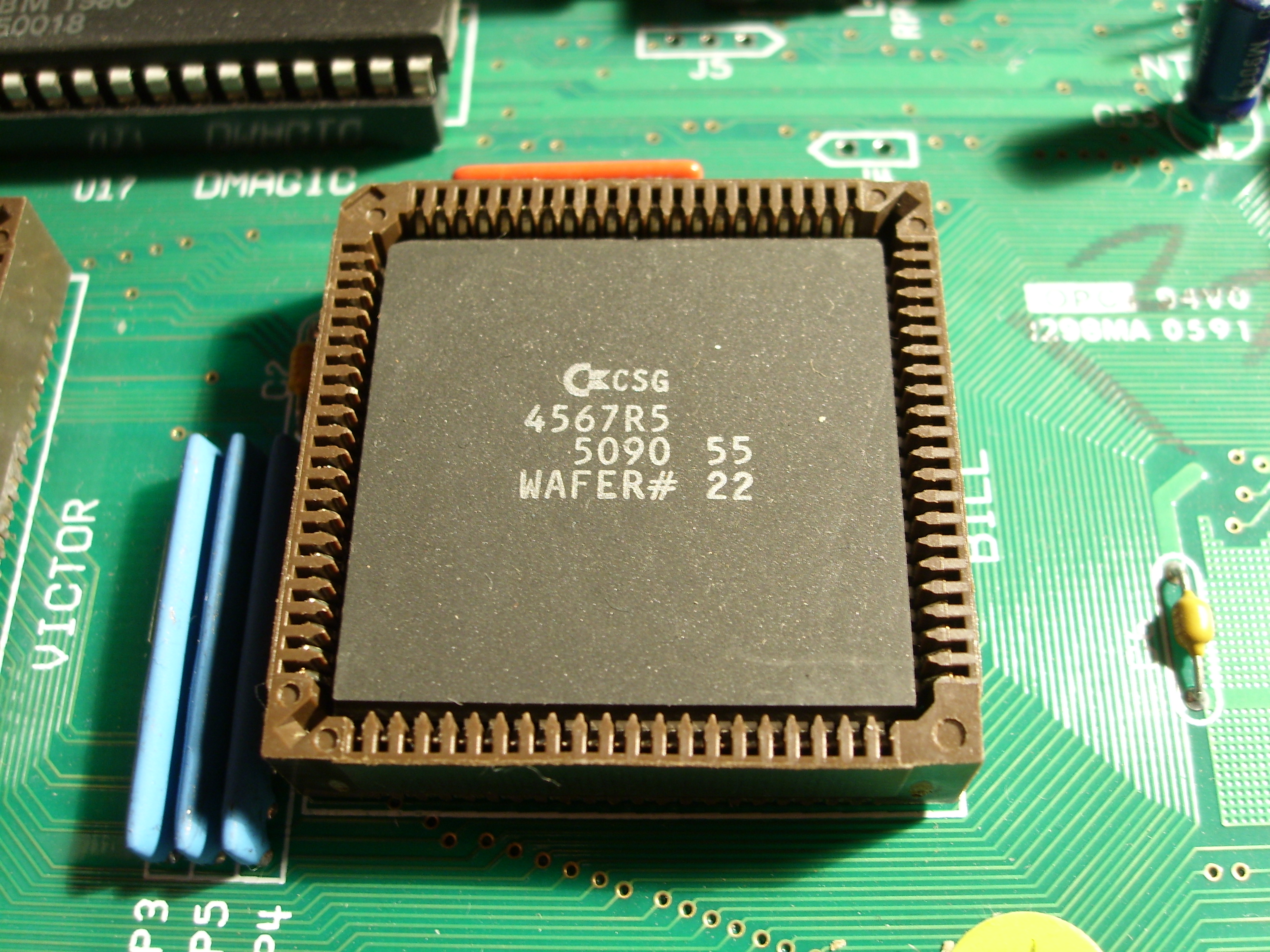 Commodore 65 - VICIII